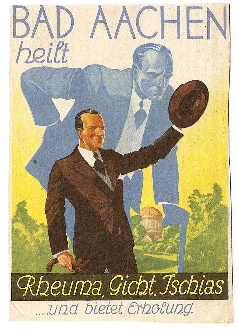 Werbekarte des Städtischen Verkehrsamtes Aachen, 1931